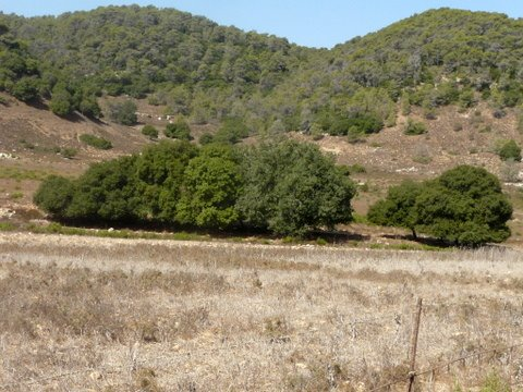 Alon Valley part of Oren Wadi. Mount Carmel, Israel קעת אלון היא בקעה באפיק נחל אורן בהר הכרמל . הבקעה משתרעת מזרחית לעספיא ותחילתה באזור בו נשפך נחל חיק לנחל אורן ברקע מורדותיו המזרחיים של הר ערקן